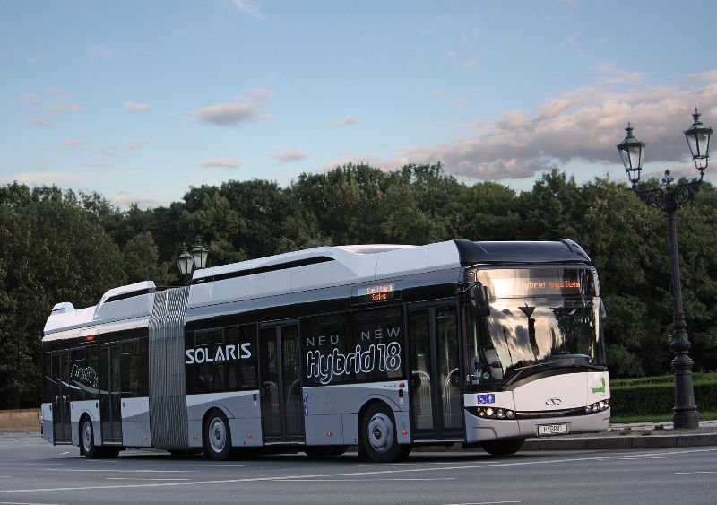 18 Hybrid Vossloh